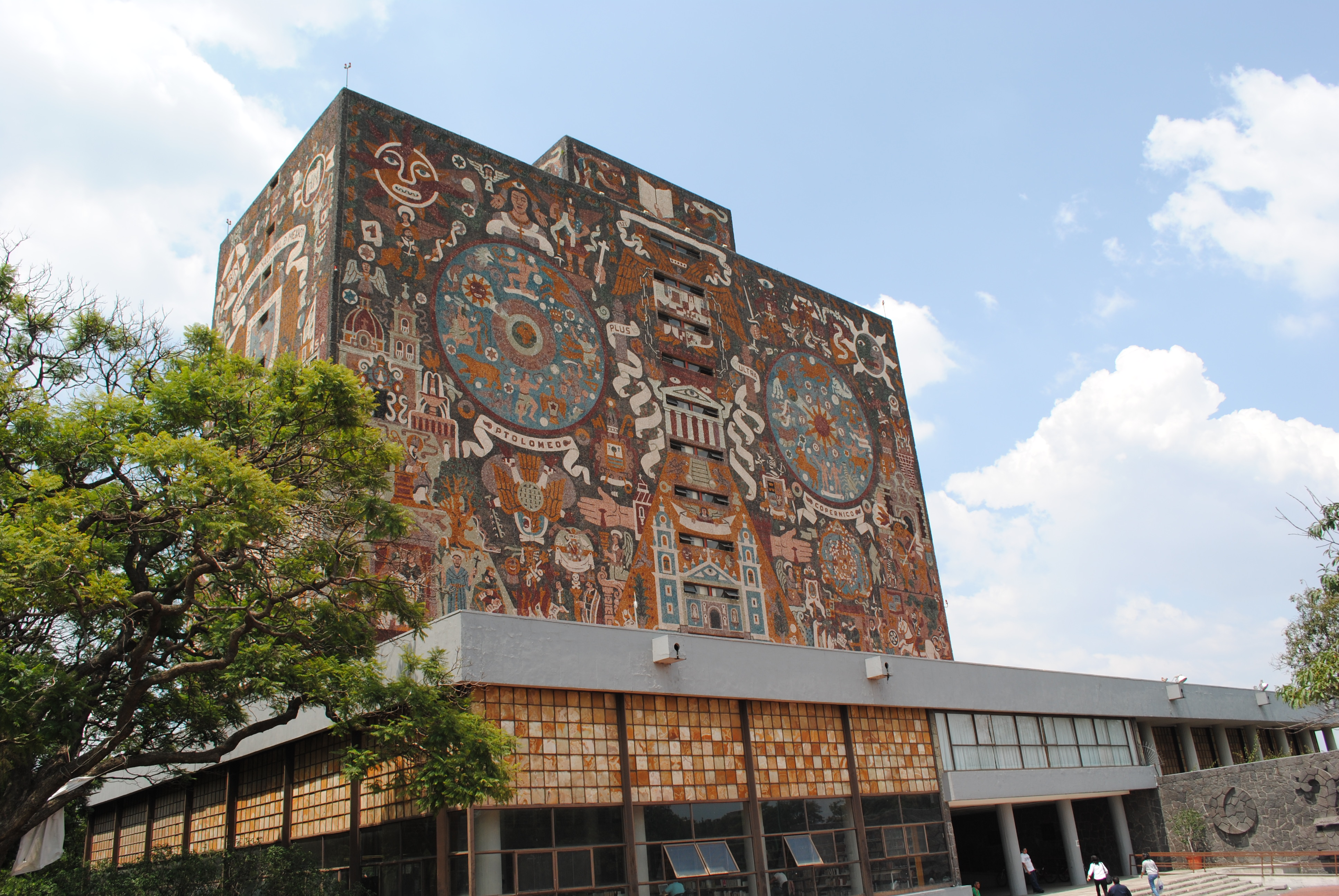 Biblioteca Central de la UNAM